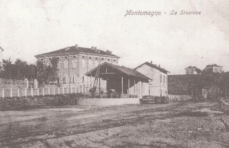 Montemagno, stazione tram